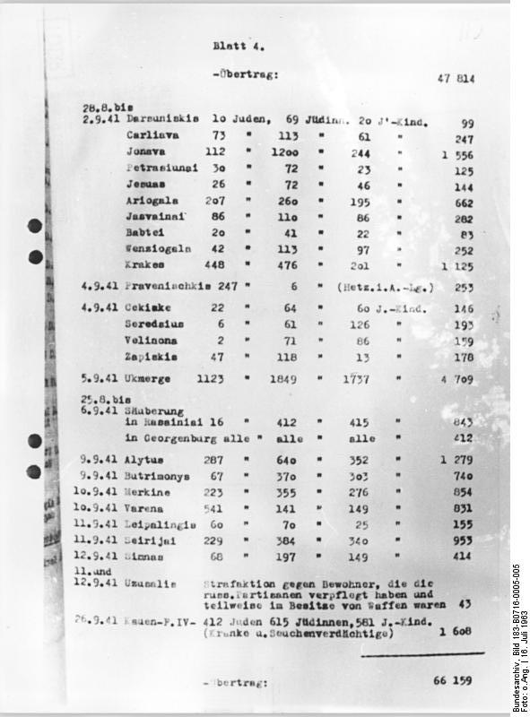 Oberstes Gericht, Globke-Prozess, Beweisstück Zentralbild 16.7.1963 Dokumente über faschistische Greuel aus der UdSSR. UBz: Reproduktion der auszugsweise während des 7. Verhandlungstages des Globke-Prozesses am 15. Juli verlesenen Dokumente über faschistische Greuel in der Sowjetunion. Pedantisch genau zieht hier ein SS-Standartenführer Jäger die grausige Bilanz: "In Litauen gibt es keine Juden mehr." (siehe auch 2 - 4 u. 5 - 10N)